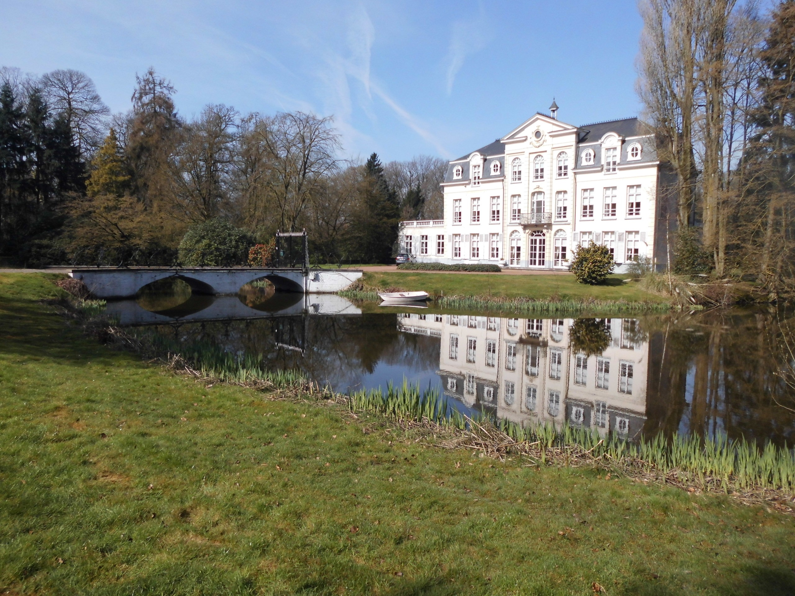 Kasteel de Lanier of kasteel van Pottelsberghe - Maria-Aaltersteenweg - Sint-Joris - Beernem - West-Vlaanderen - België